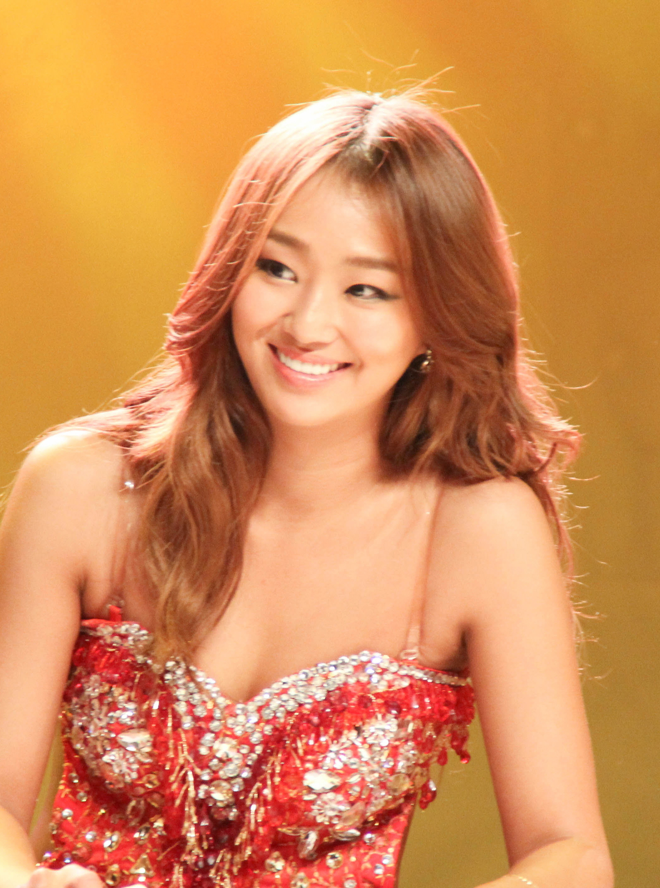 140602 효린 태양의마테차 쇼케이스